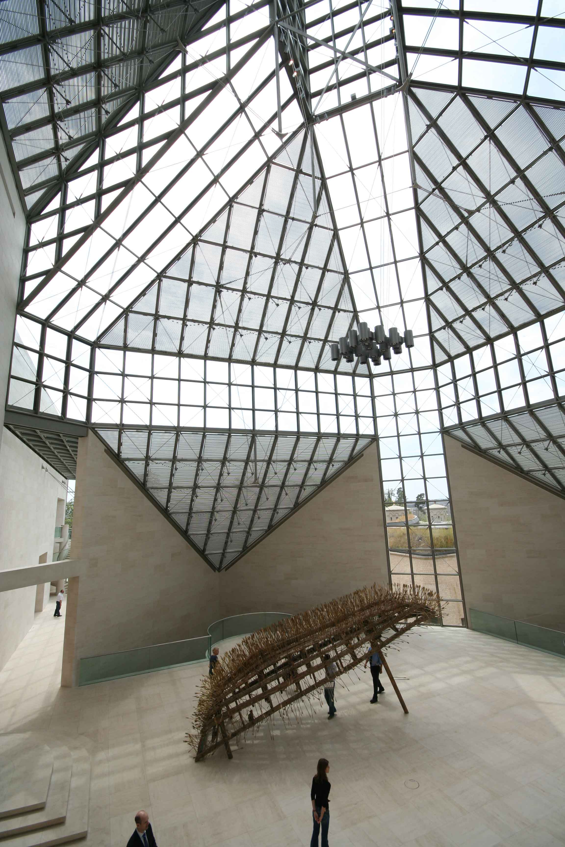 Mudam: Den Hall